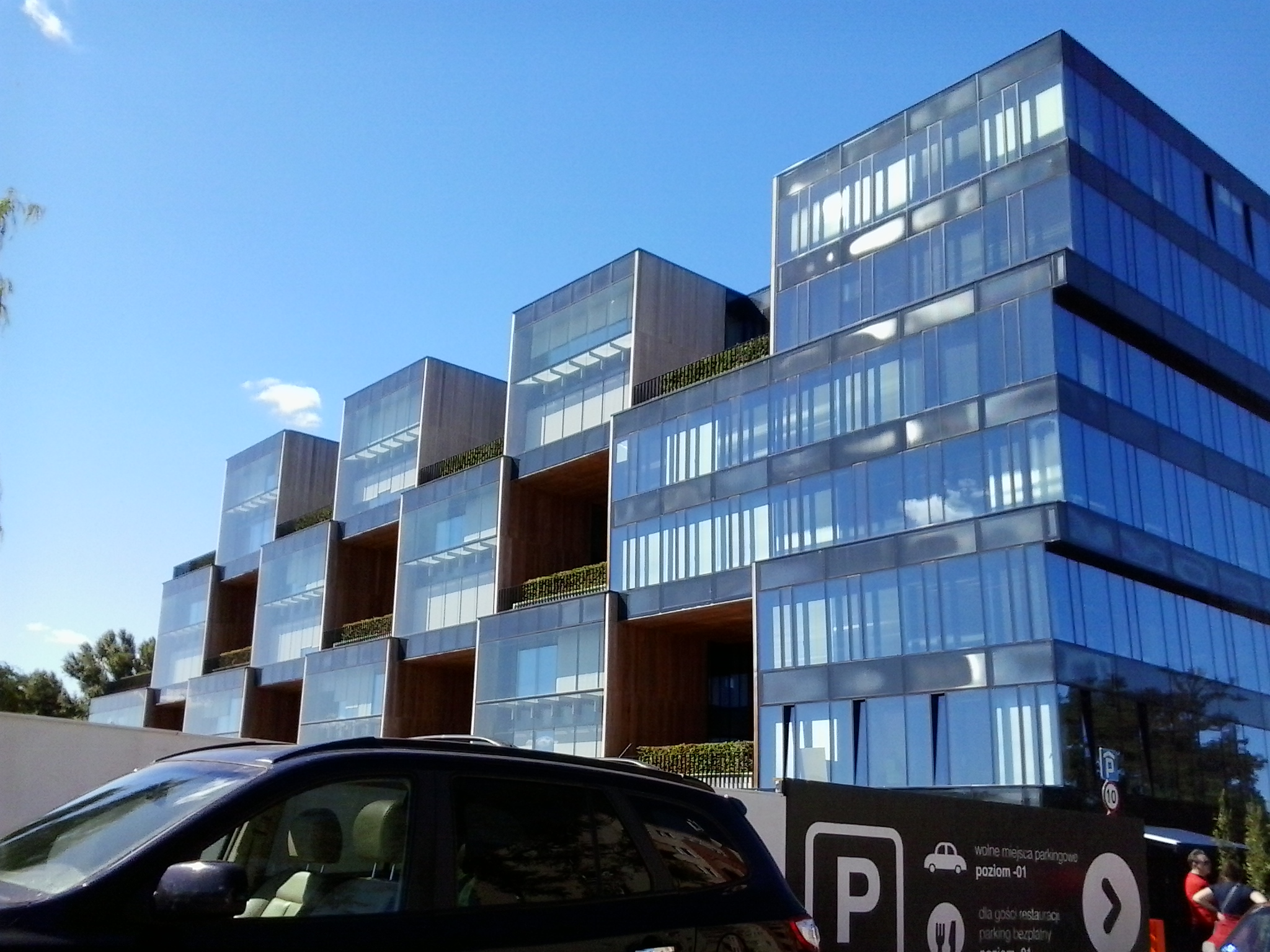 Pixel - siedziba Allegro. Poznań, ul. Grunwaldzka.